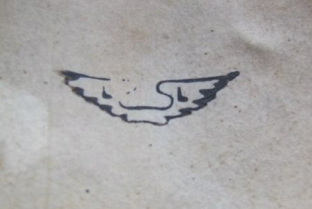 Louis Lourioux (1895-1930) Signature aux "deux L"